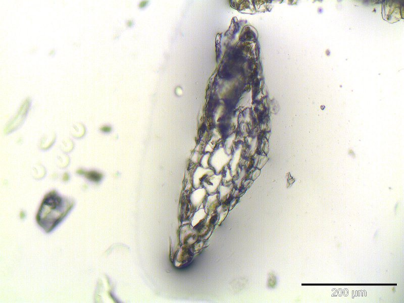 Buchtiges Riccardimoos (Riccardia chamedryfolia), Thallusquerschnitt, Vergrößerung: 125x